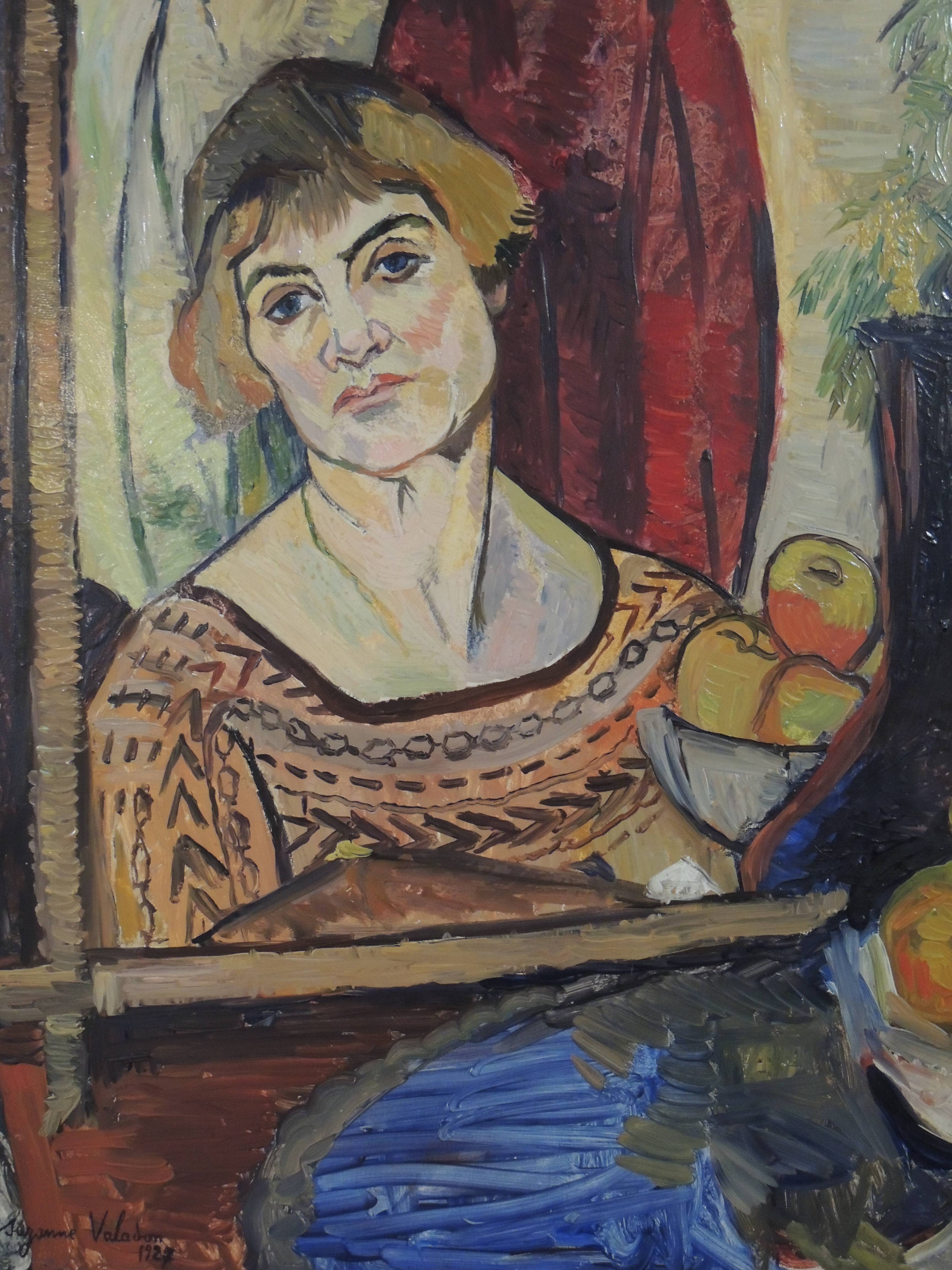 Suzanne Valadon, Autoportrait, huile sur carton marouflé sur bois